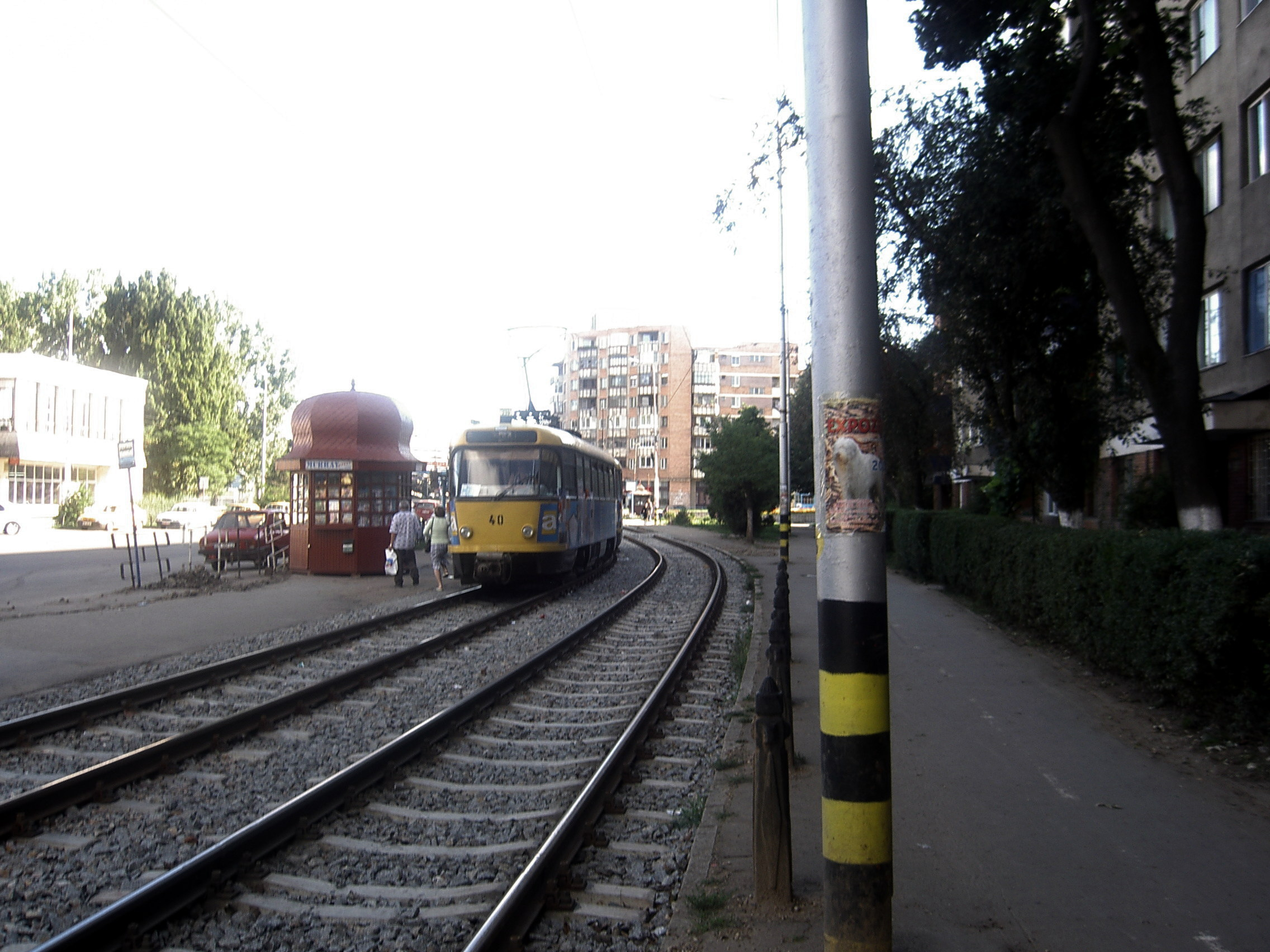 Oradea, tramvaj